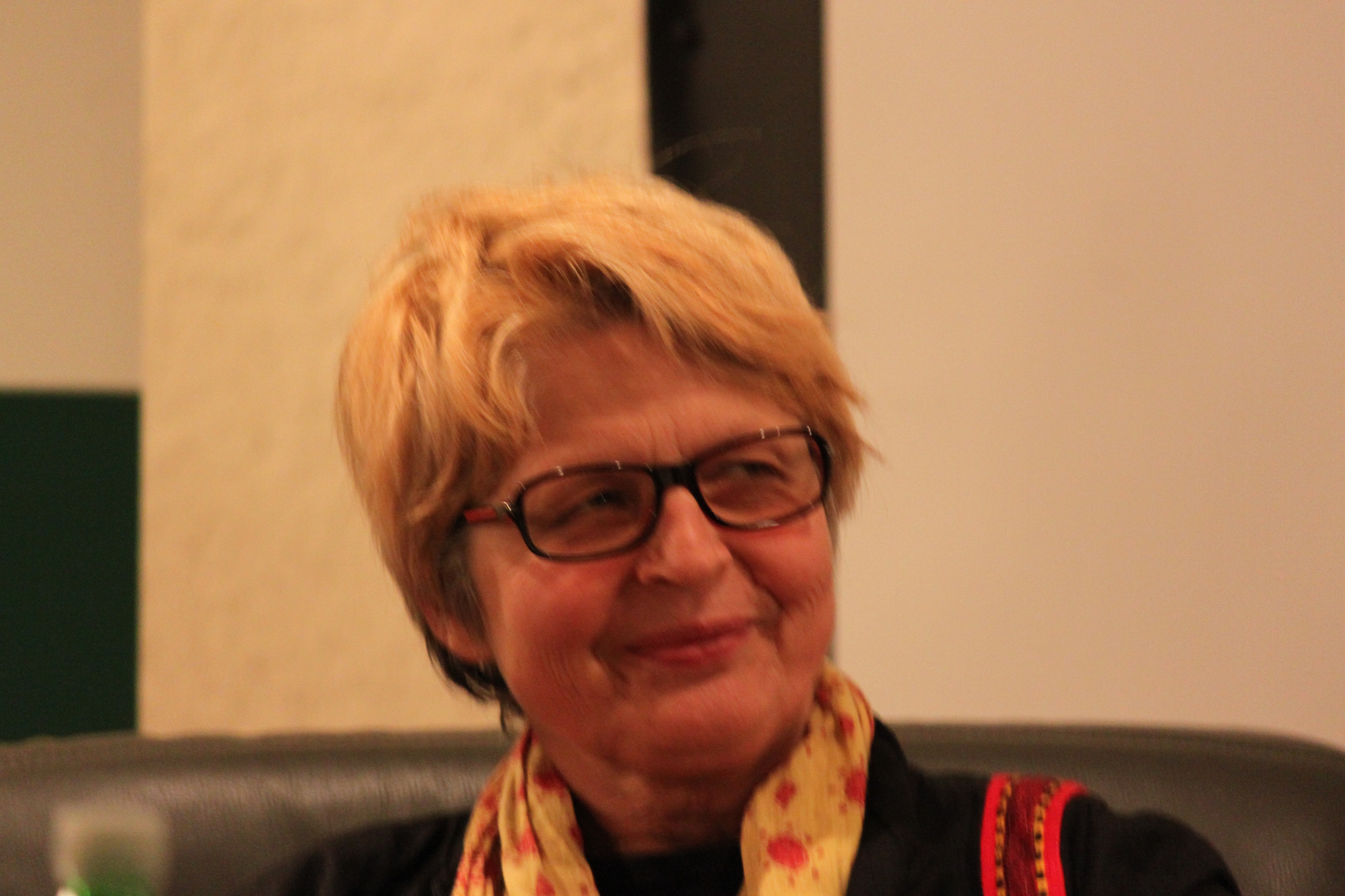 Ursula Baatz bei einer Diskussion in Gföhl in Niederösterreich